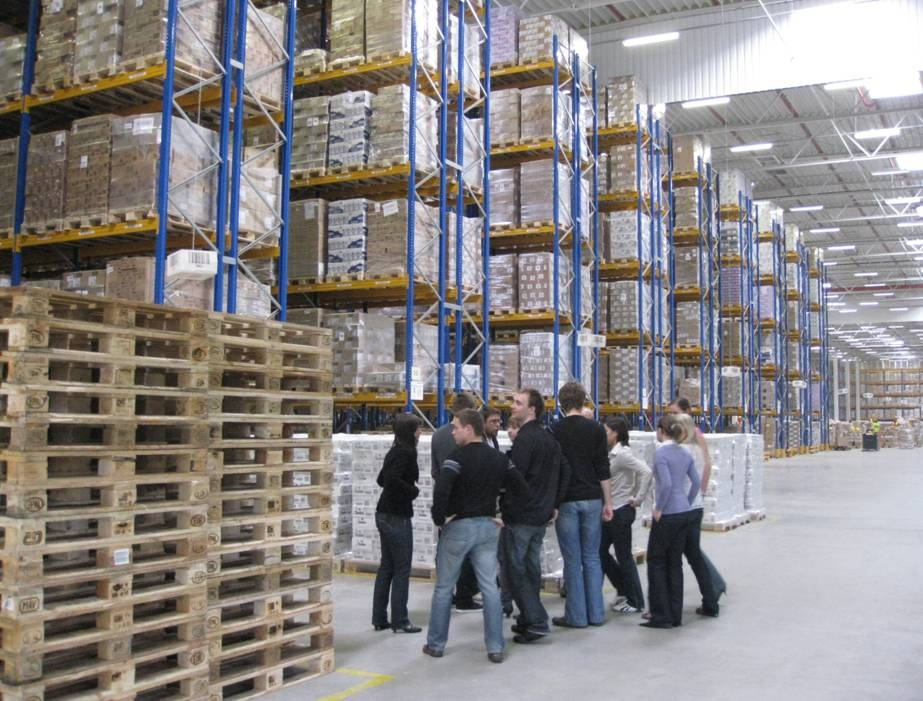 Magazyn w Rabenie